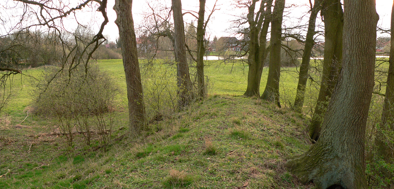 Wallrest der Bunkenburg in Ahlden